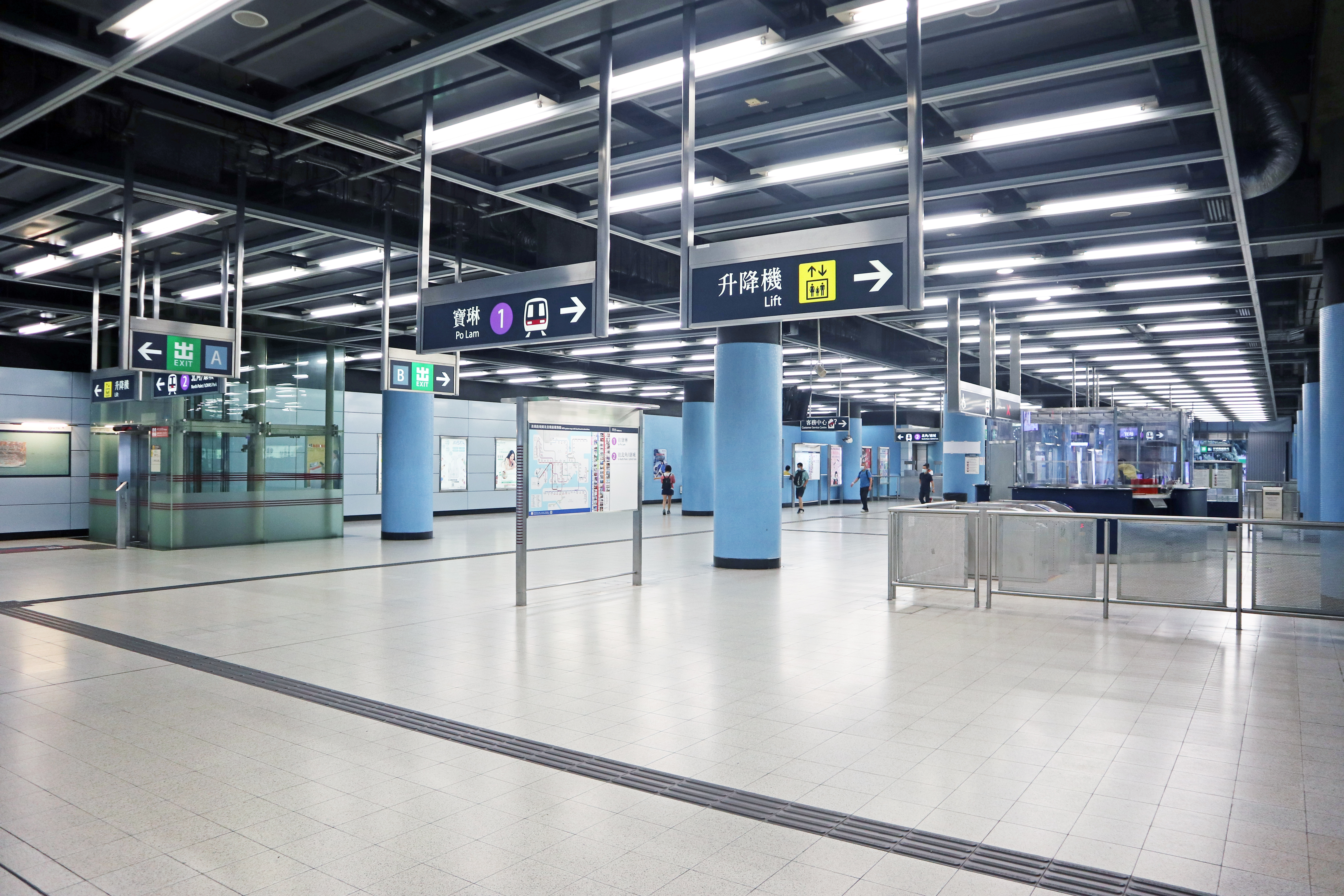 港鐵坑口站大堂